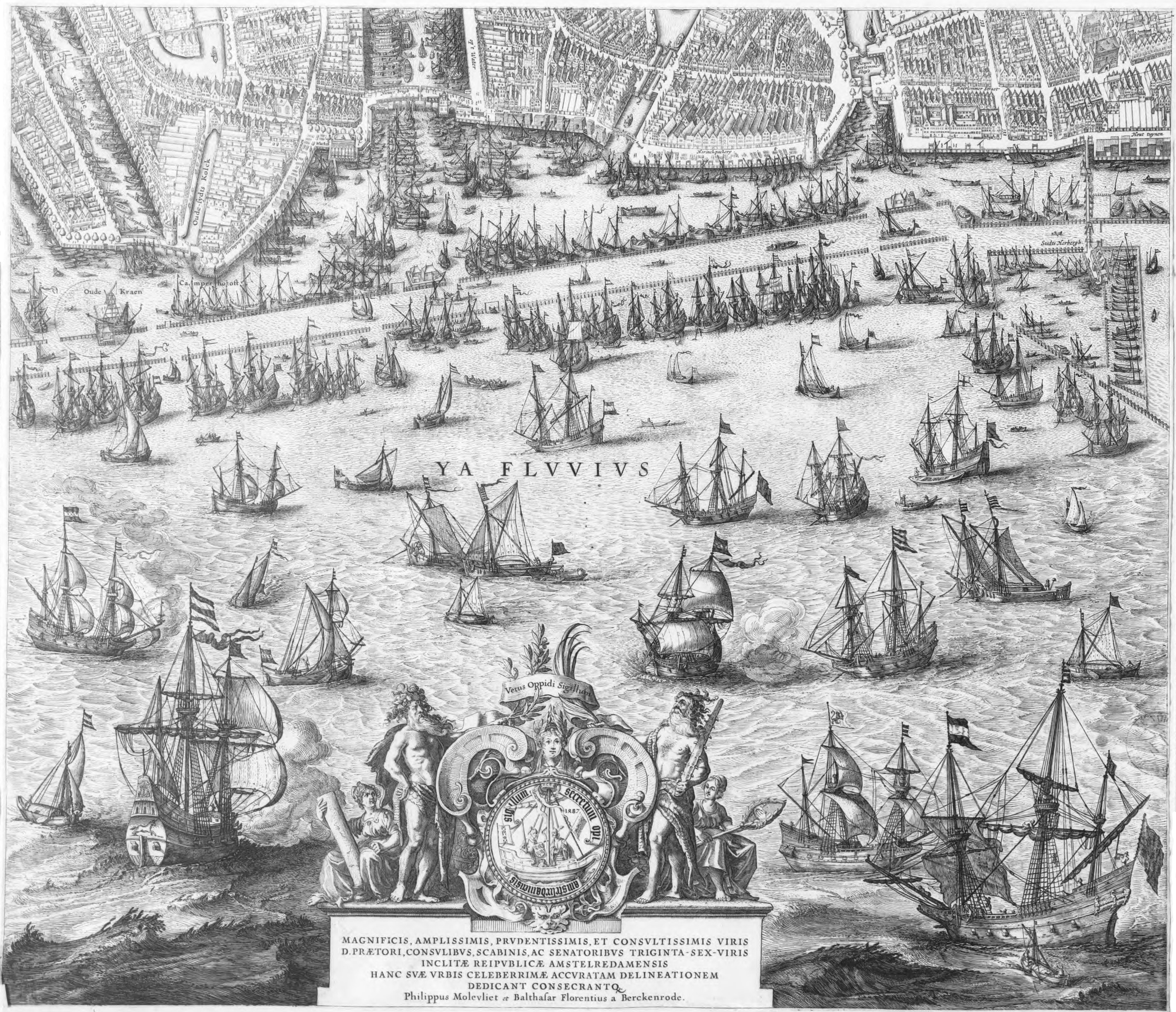 Hanc tabulam florentissimae urbis summa diligentia et arte pinxit atque aere expressit Balthazar Florentius Batavus.